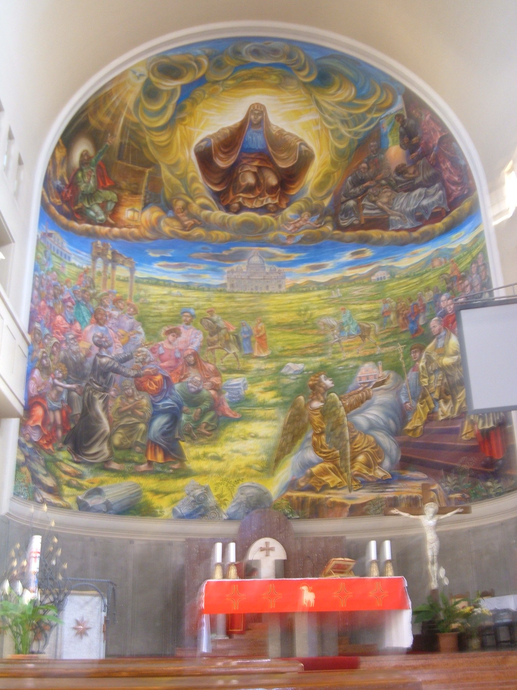 Interno della chiesa di san Filippo Neri in Eurosia a Roma, nel quartiere Ostiense, in via delle Sette Chiese. Abside.